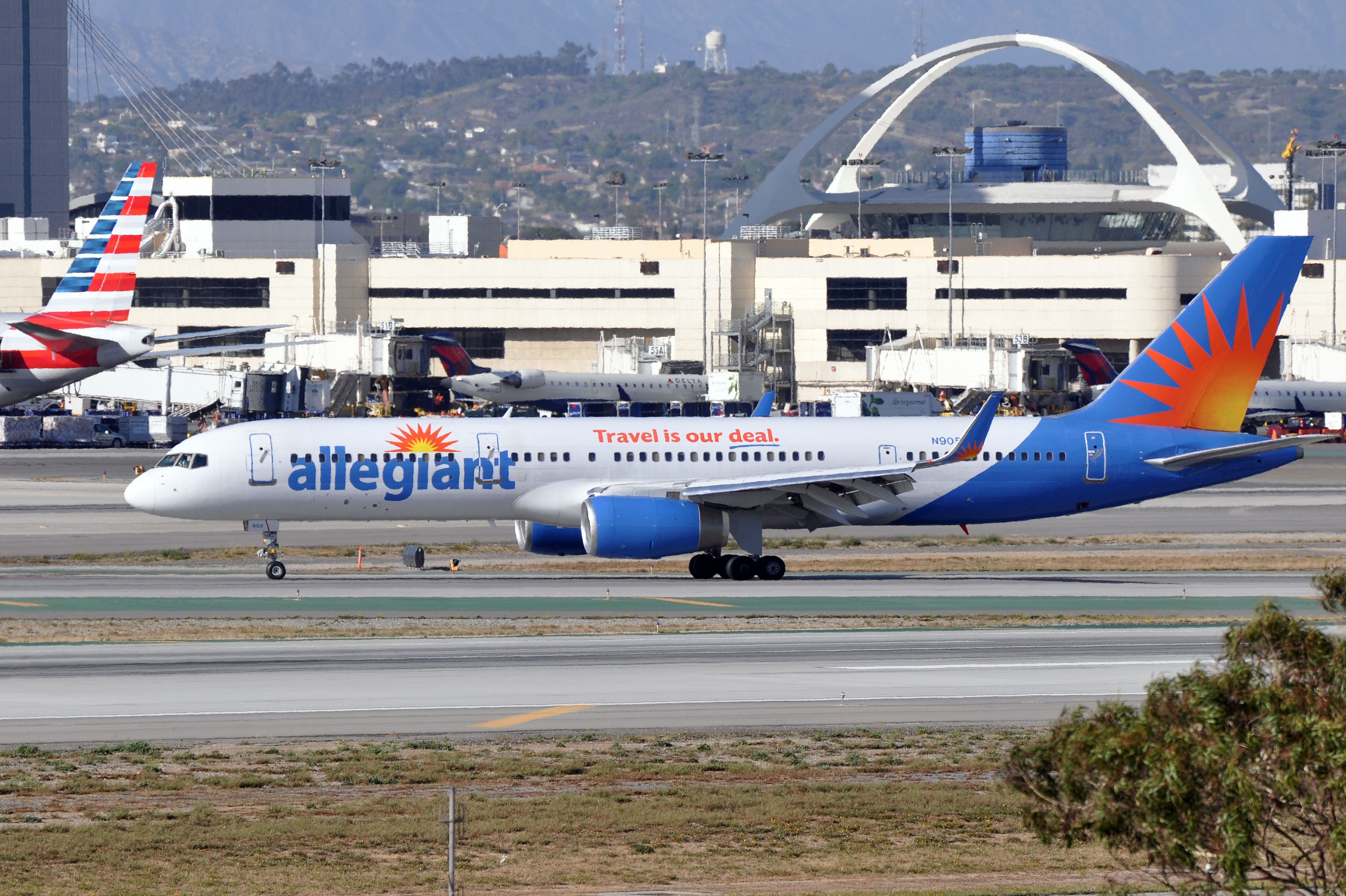 MSN 27235 LN 598 B757-204 ALLEGIANT AIR LAX AIRPORT EX BRITANNIA AIRWAYS AND THOMSON AIRWAYS AS G-BYAO